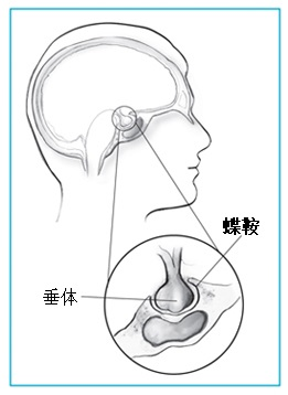 垂体位于蝶鞍。